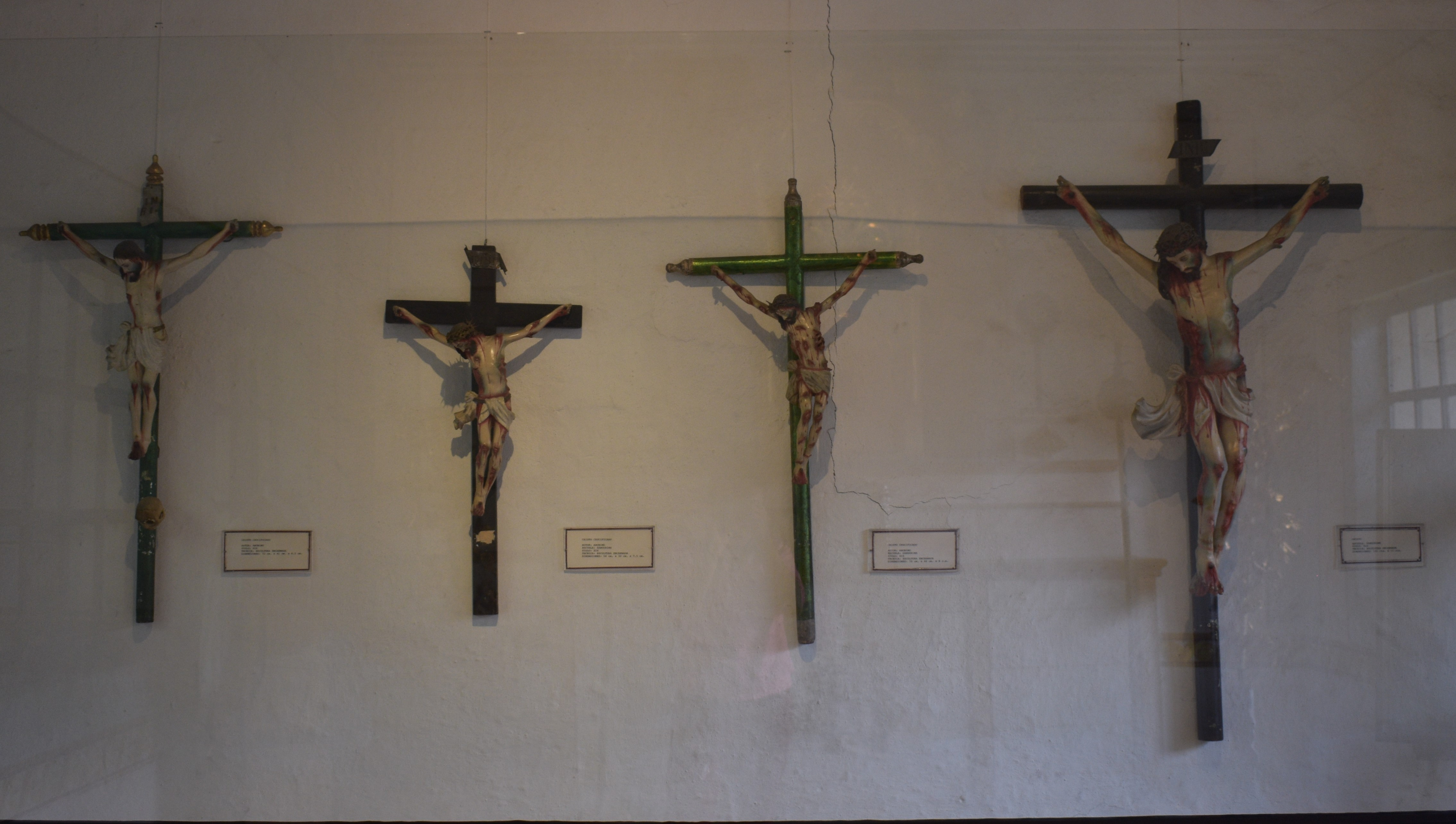 Escuela: Gaspar de Sangurima. Escultor Azuayo. Siglo: XlX